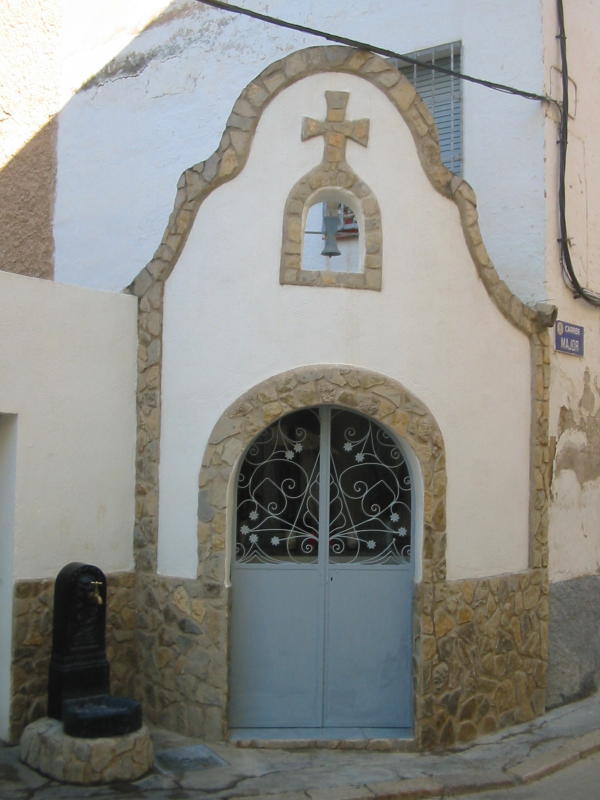 Capella de Sant Zenó (Xerta)